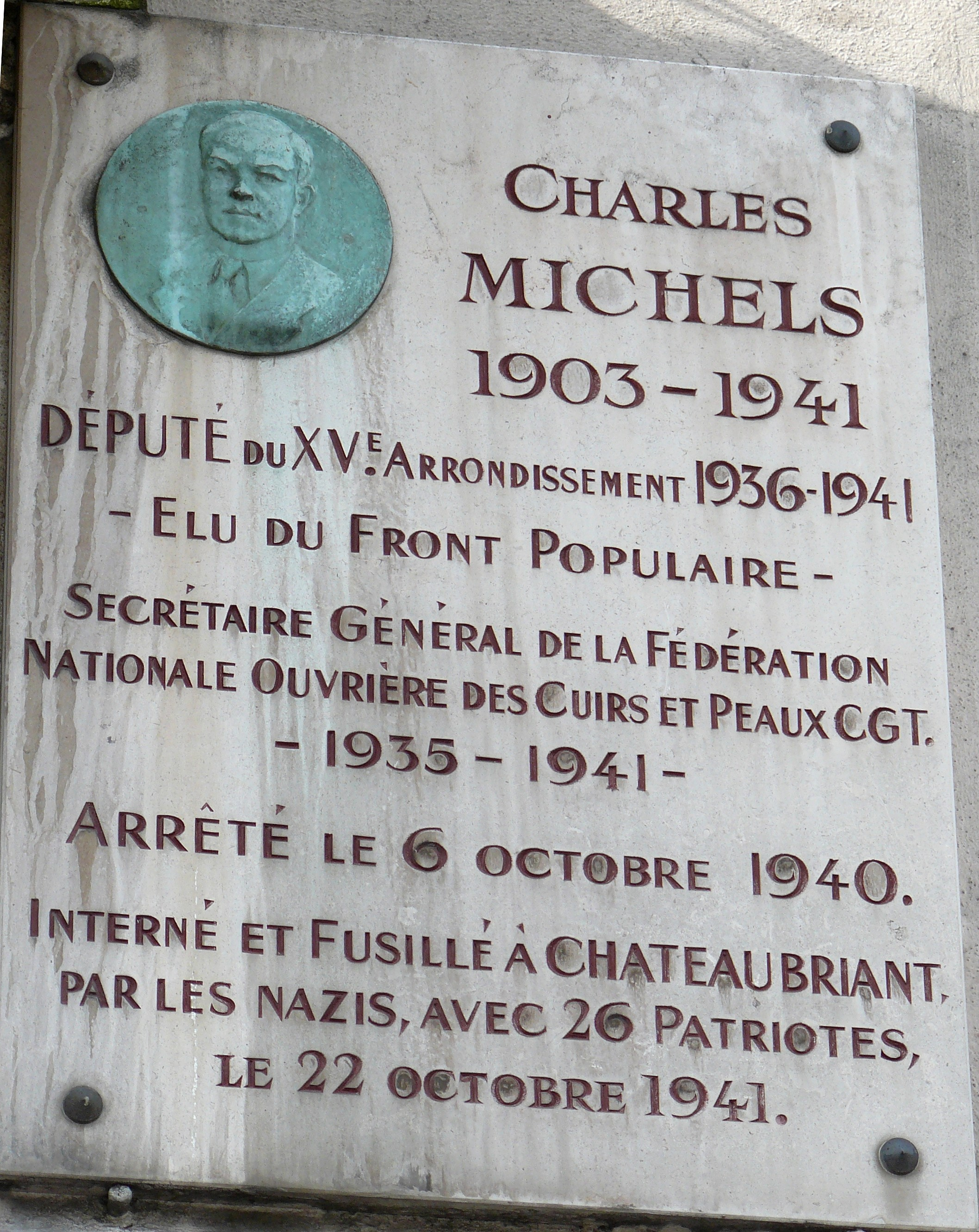 Plaque apposée sur un mur (place Charles Michels, coin de la rue St.Charles et Bd. E.Zola) Paris XVème arrond.